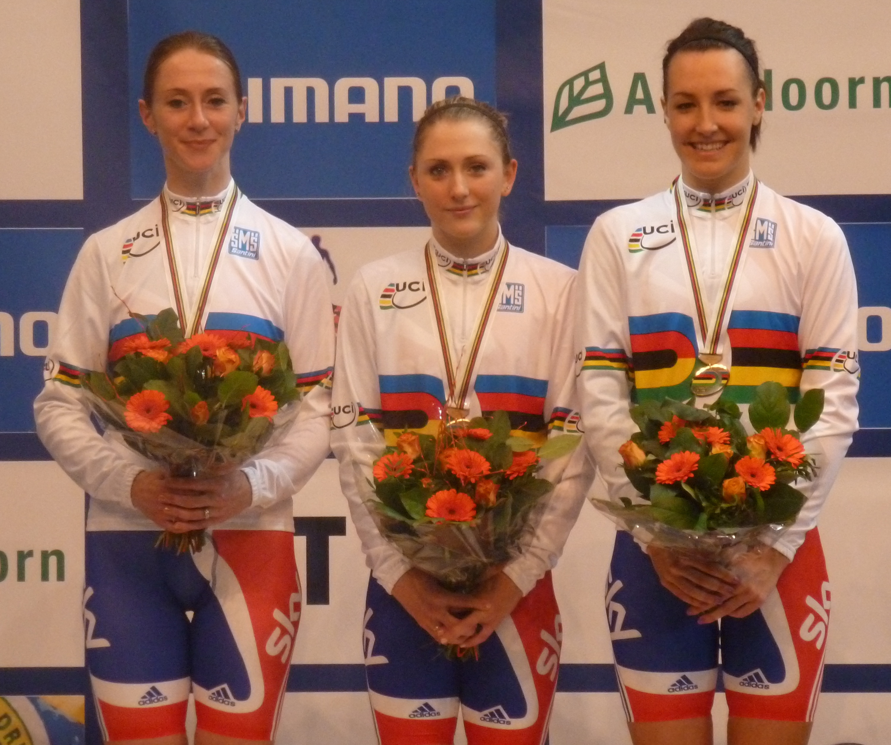 Die britische Weltmeistermannschaft in der Verfolgung bei der Bahn-WM in Apeldoorn, v.l.n.r.: Wendy Houvenaghel, Laura Trott, Danielle King